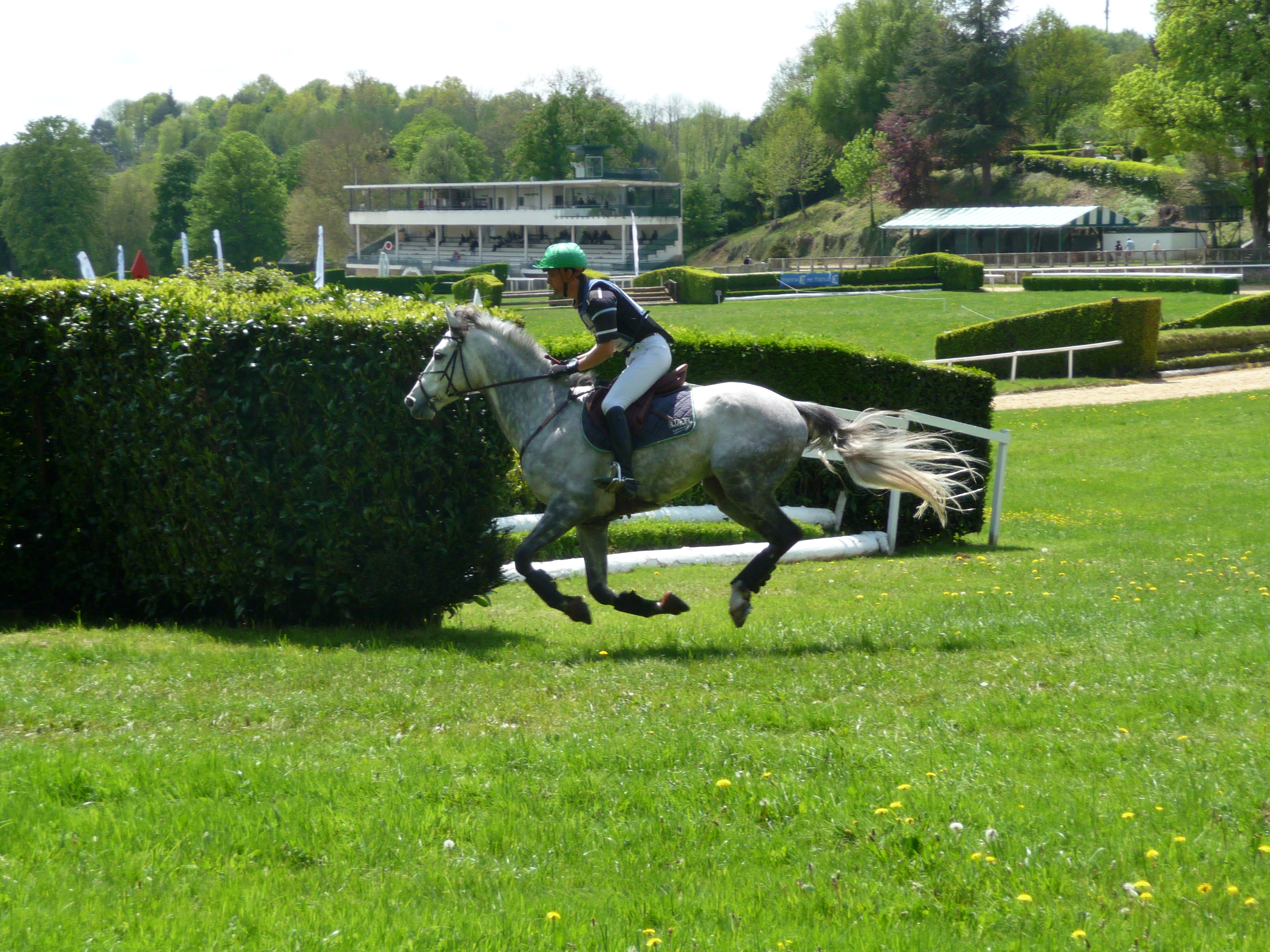 Nicolat Touzaint et O'Ryon de Cazeneuve, hongre anglo-arabe, lors des Championnats de France de CCE "Master Pro" 2009 à Pompadour, France